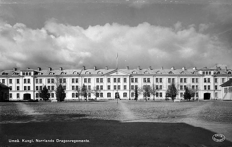 Kungliga Norrlands dragonregemente.; Byggnadsverk; Försvarsväsen; Regemente